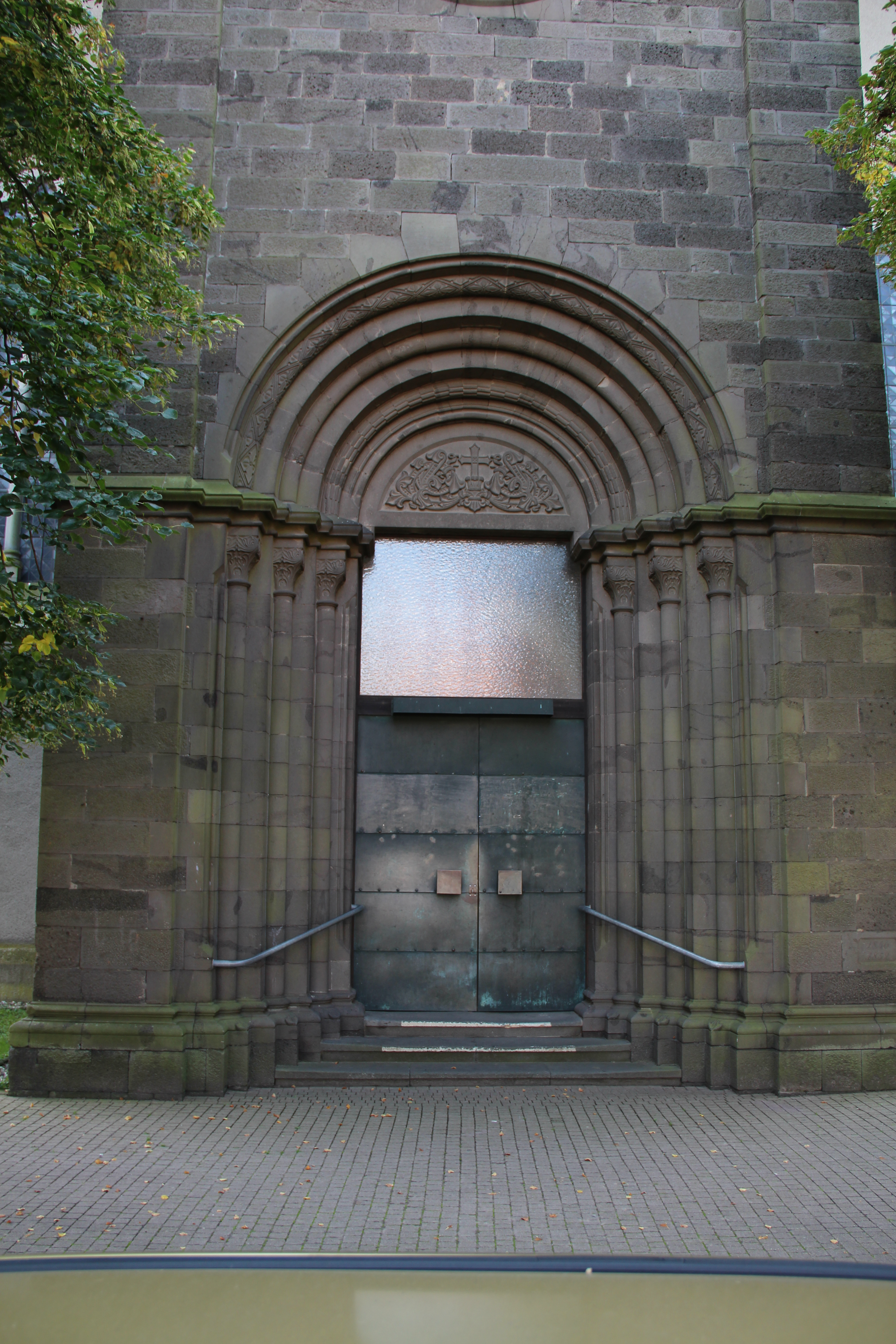 Ev. Kirche